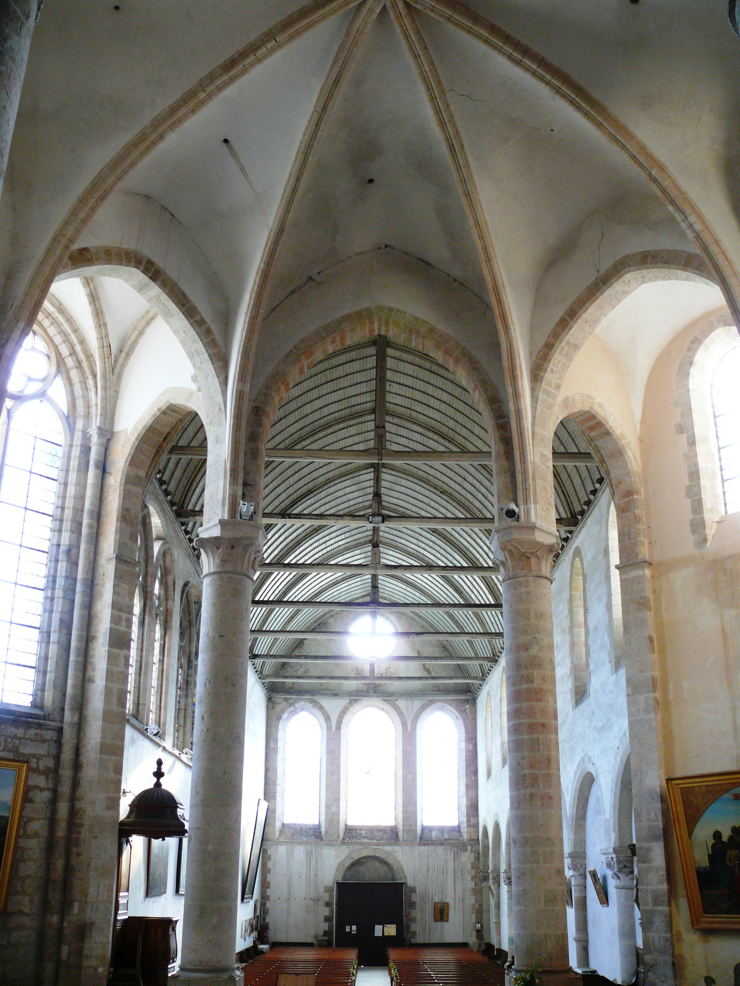 Ferrières-en-Gâtinais - Abbaye - Nef vue du choeur